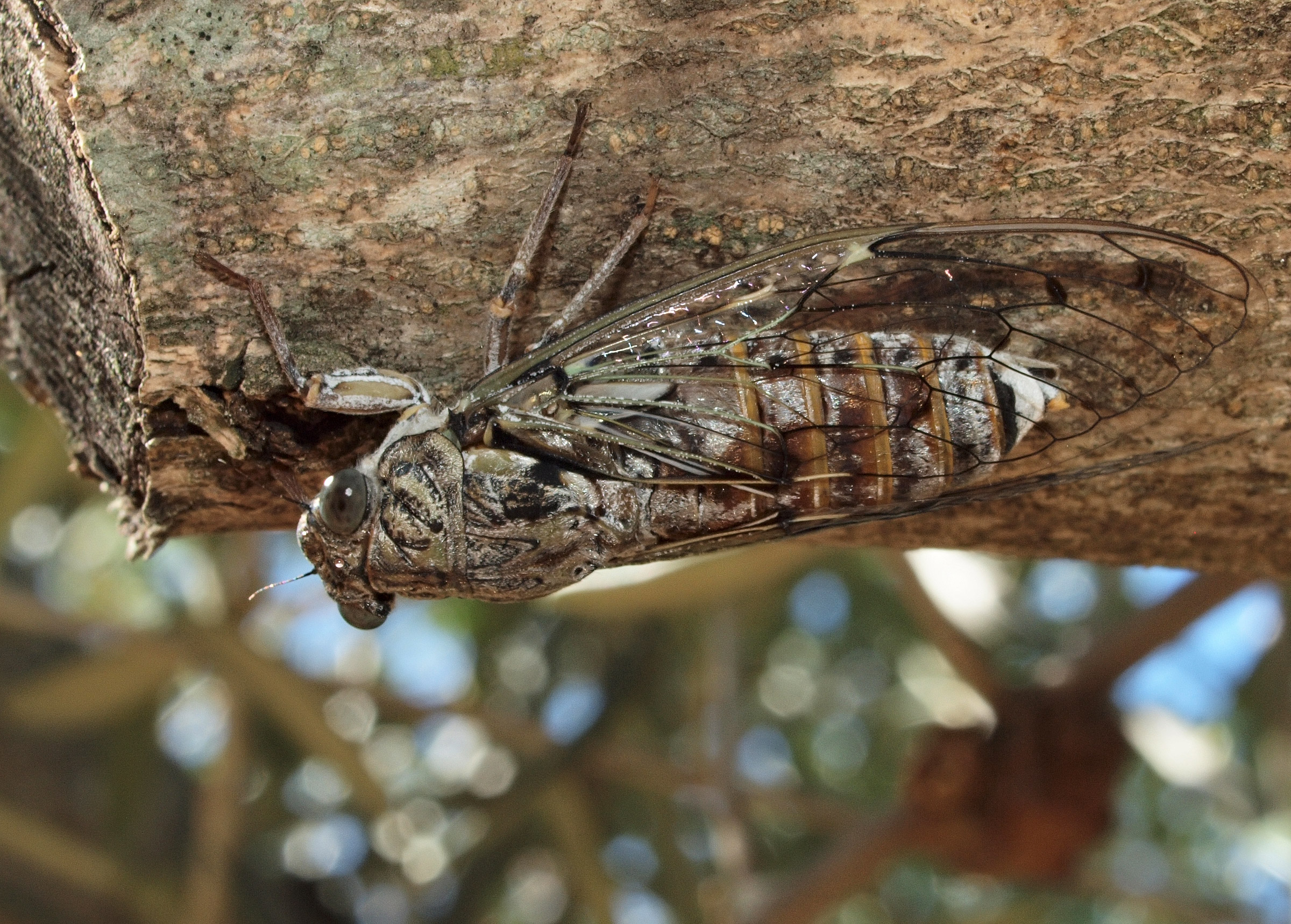 Cicada barbara cf. subsp. lusitanica en una rama de olivo (Olea europaea). Losar de la Vera (Cáceres, España).